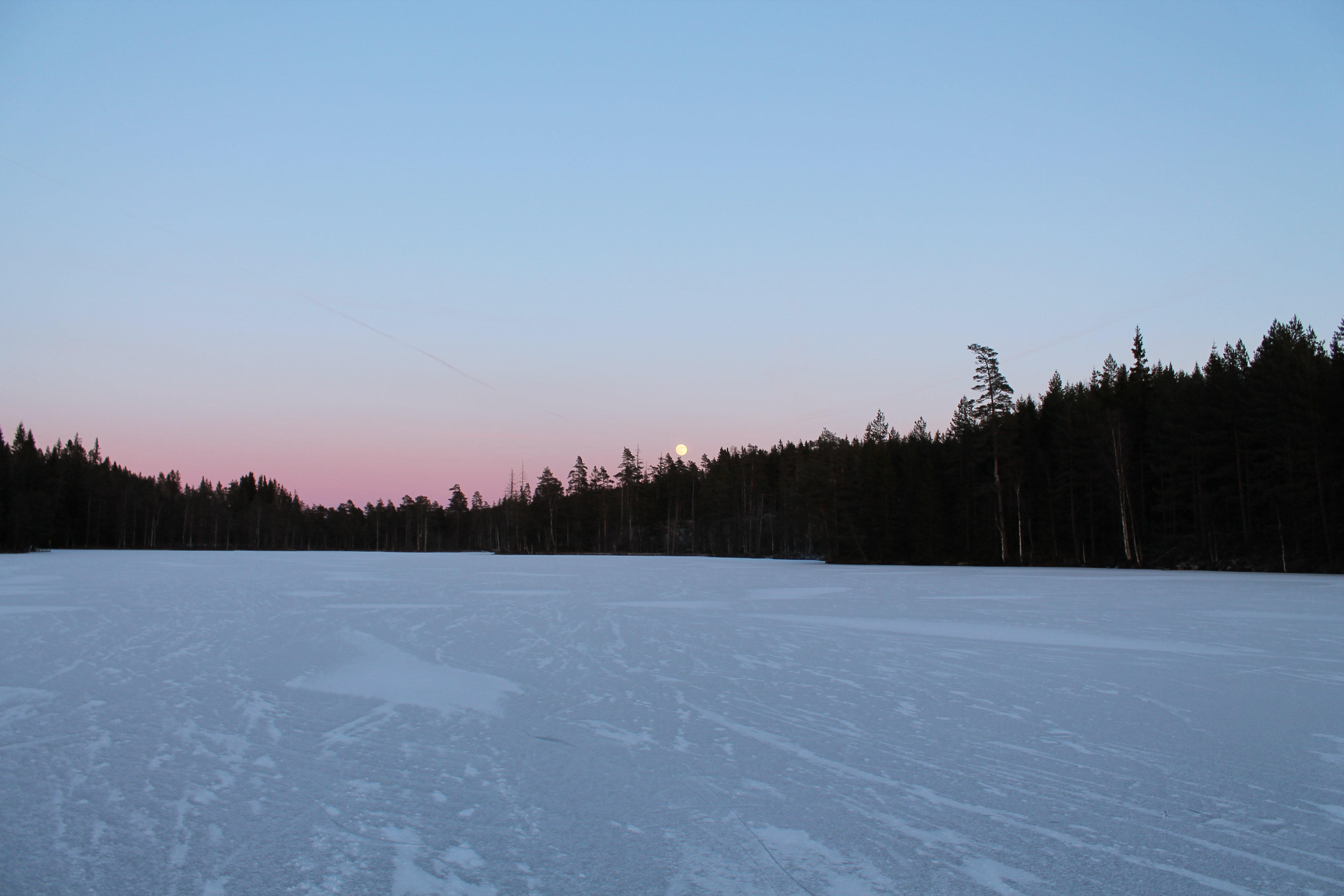 Påbosjön tagen norrut